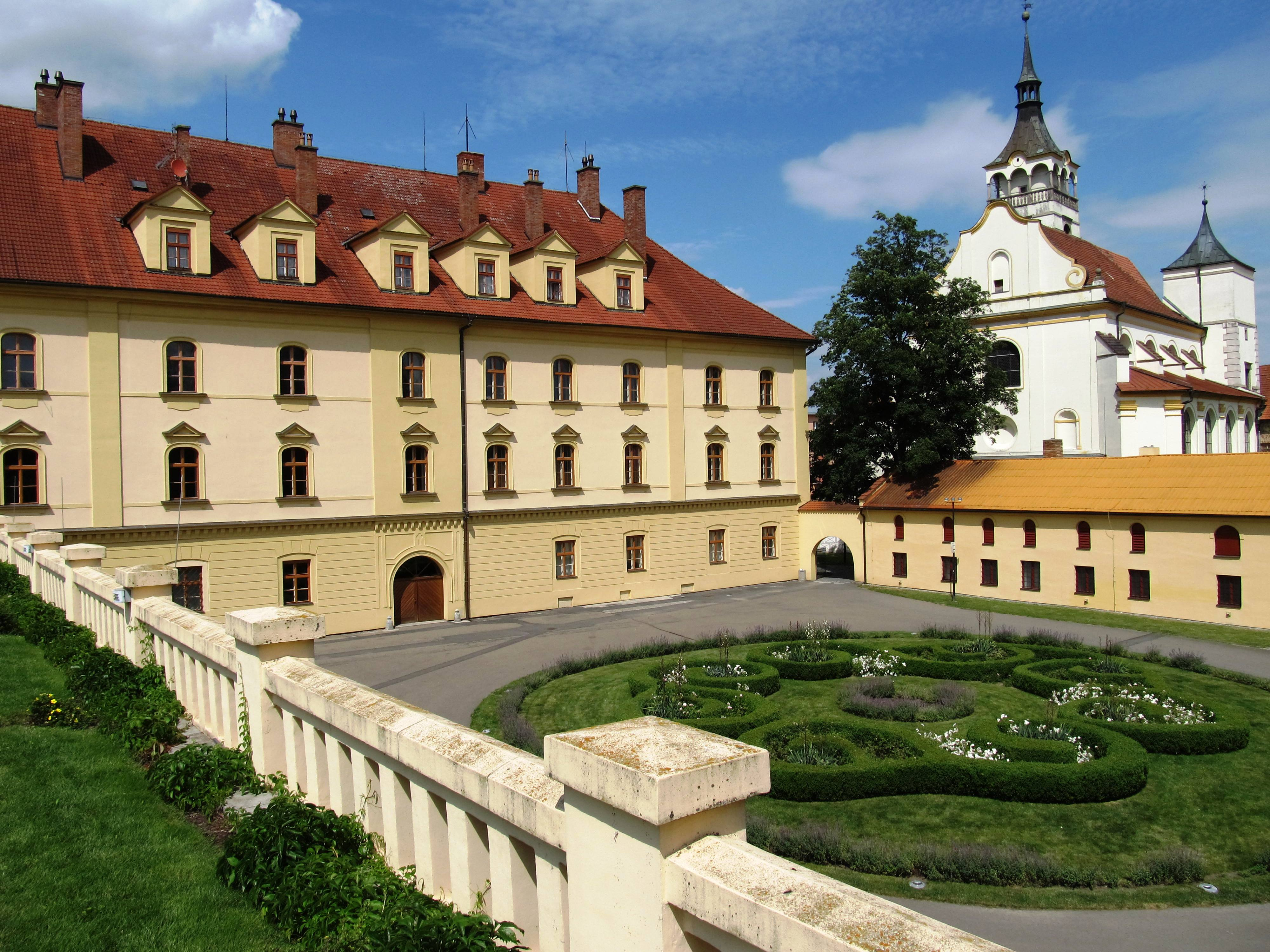 (1) Lipnik nad Becvou